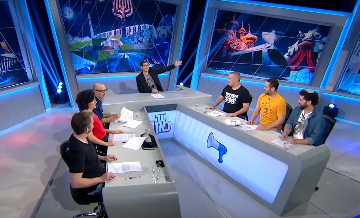 תוכנית הטלוויזיה "עד כאן!"